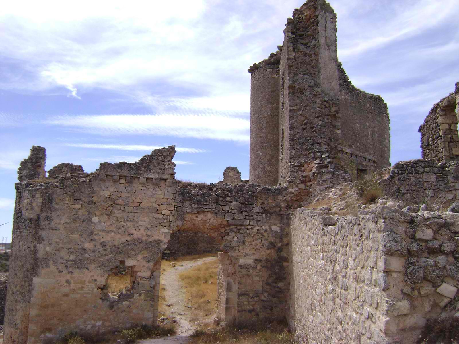 Entrada al segundo recinto. Torres del primer recinto a la derecha